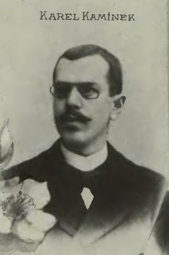 Portrét – Karel Kamínek (1868 - 1915), Český spisovatel a dramatik.